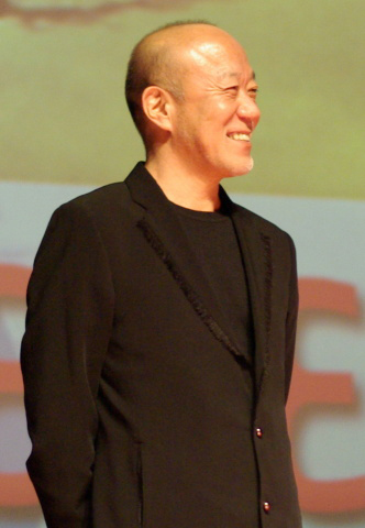 Joe Hisaishi au festival du film asiatique de Deauville